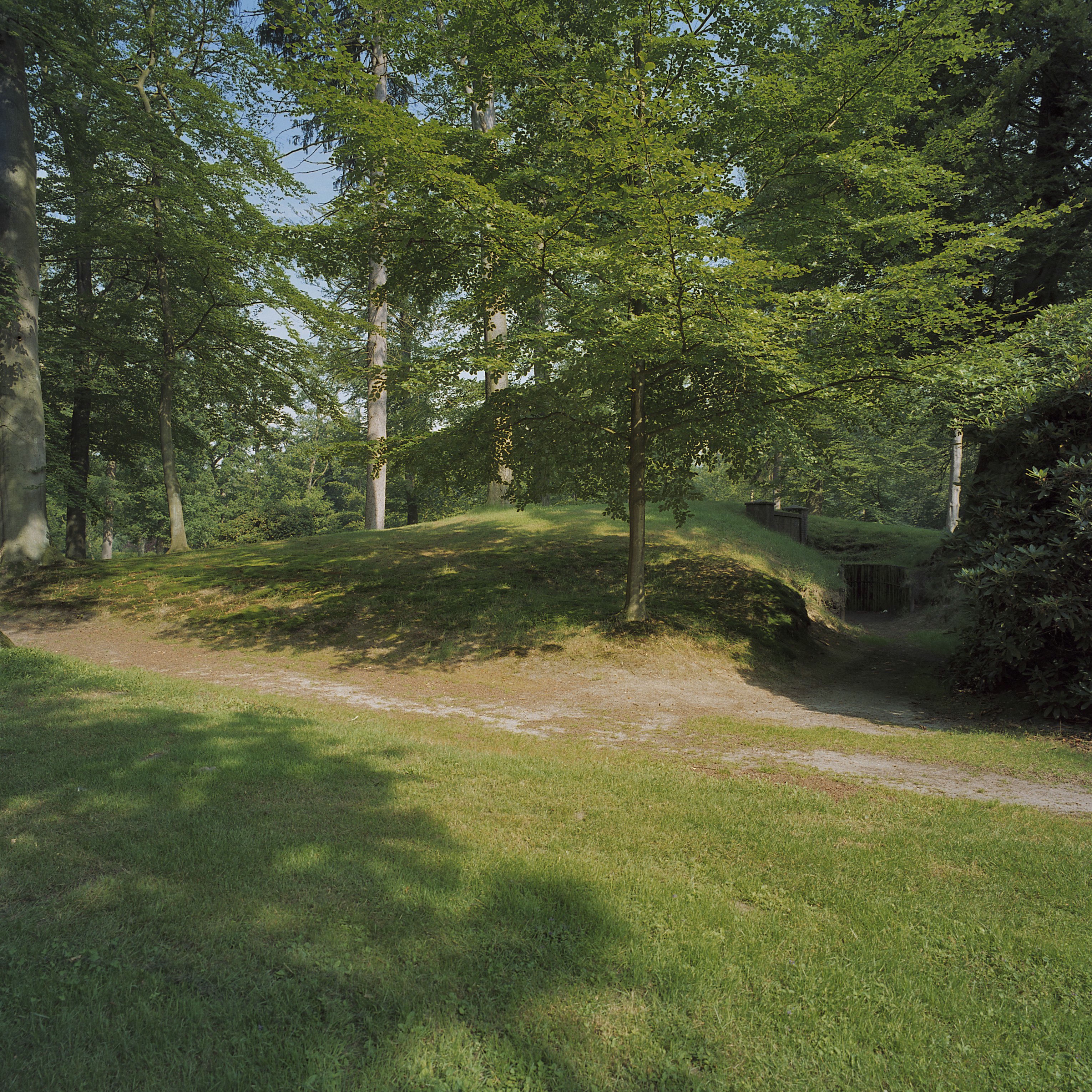 Overzicht ijskelder in park van het Kasteel Staverden